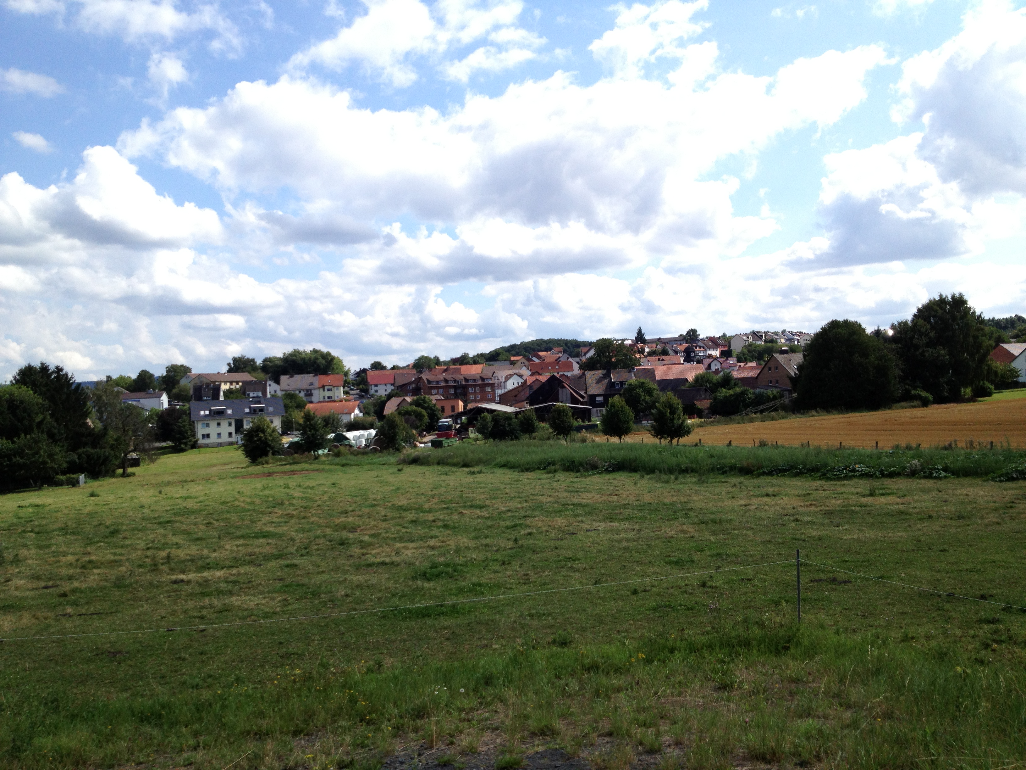 Blick von der Knallhütte auf Rengershausen; Baunatal Rundweg